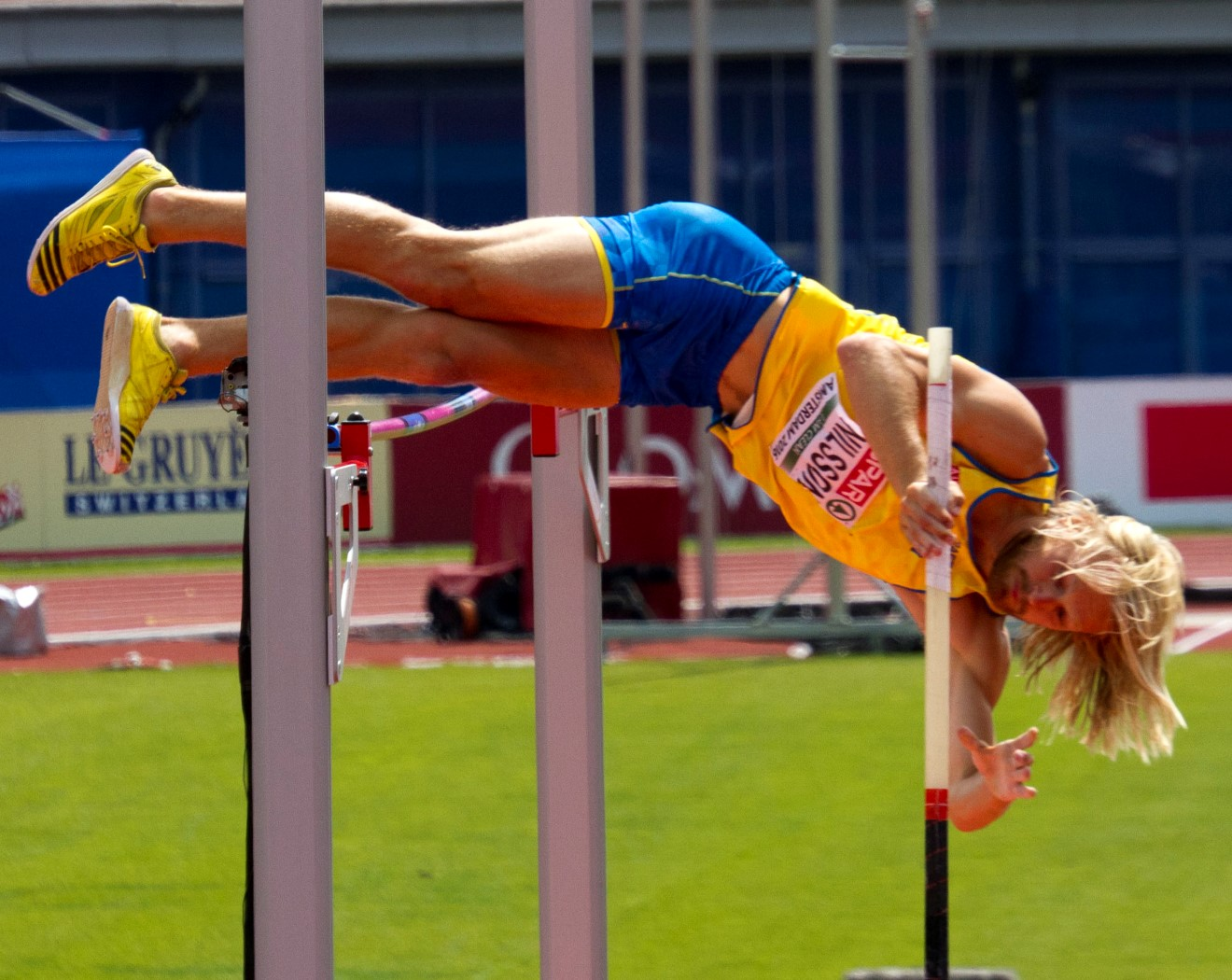 0486 nilsson polsstok